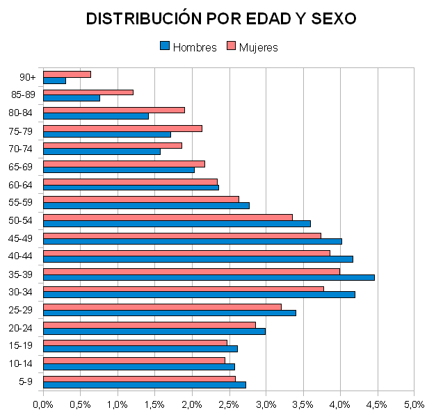 Gráfico de la distribución de población de Castilla-La Mancha por grupos quinquenales en 2013